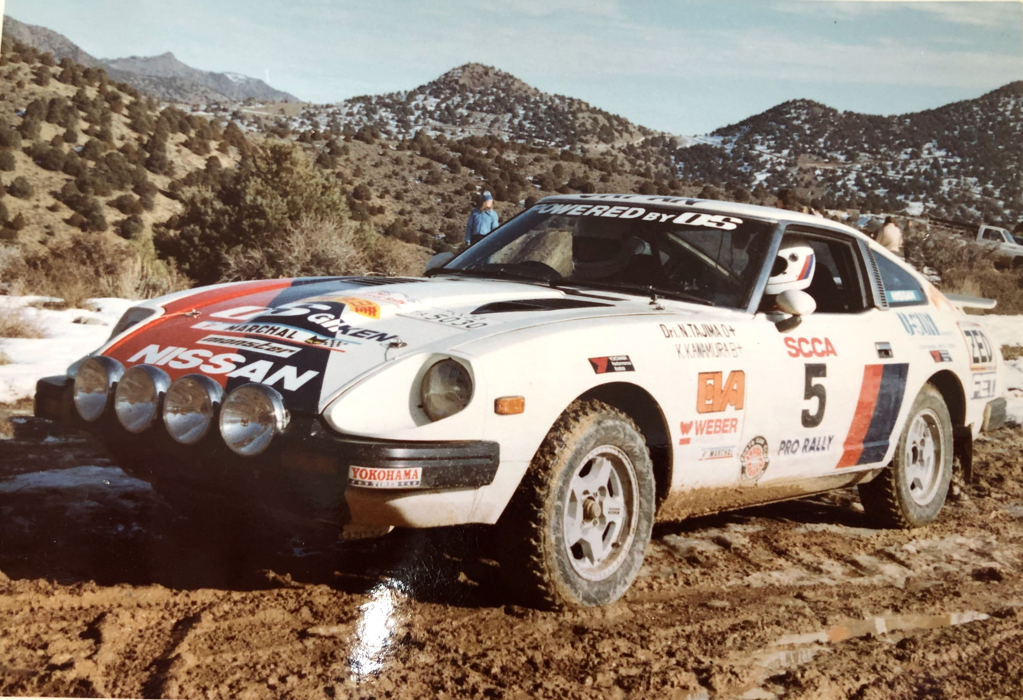 １９８２年ＳＣＣＡ参戦車両